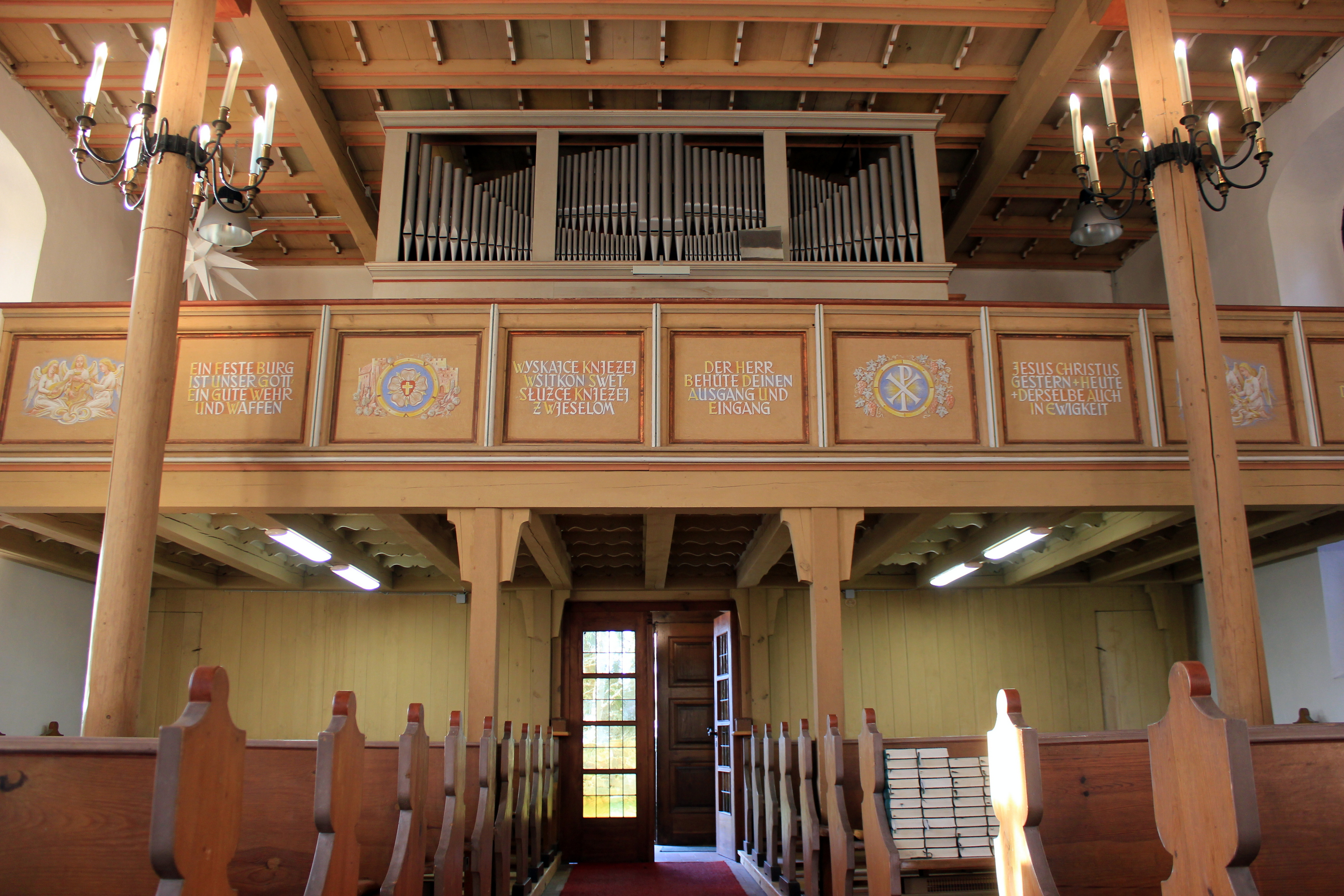 Hornjoserbsce: Ewangelska cyrkej w Kotecach.